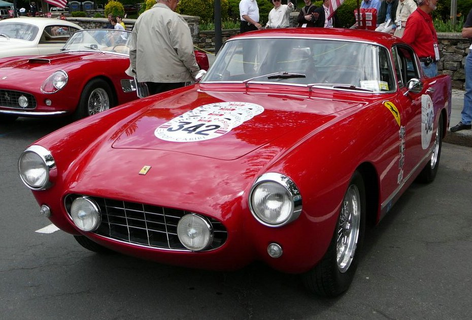 1959 Ferrari 250 GT Boano